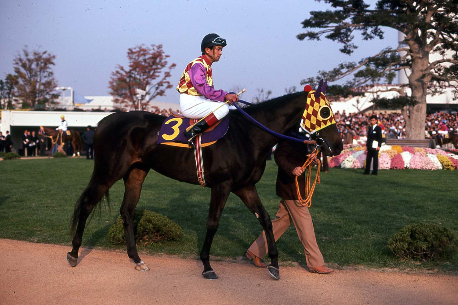 １９８１年エリザベス女王杯